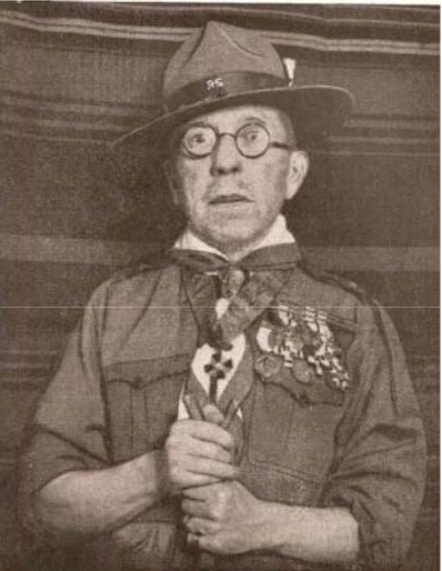 Teodoro Iradier en una imagen de 1936 con uniforme de explorador rover.